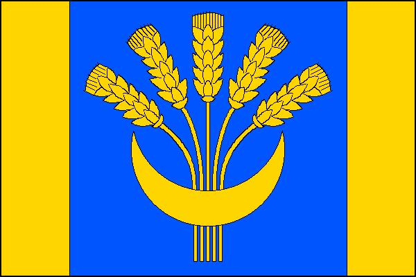 Vlajka obce Chodouny